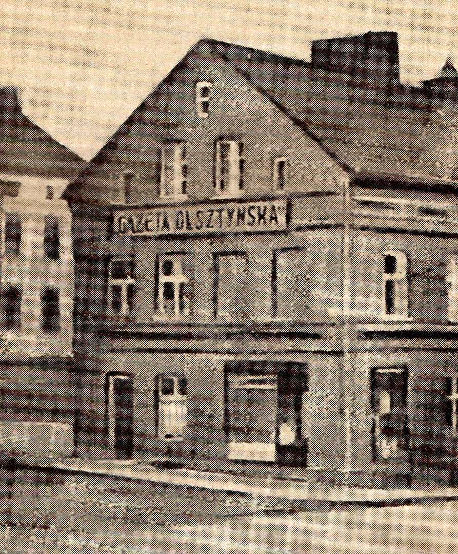 Budynek Gazety Olsztyńskiej zburzony w 1939 przez Niemców.